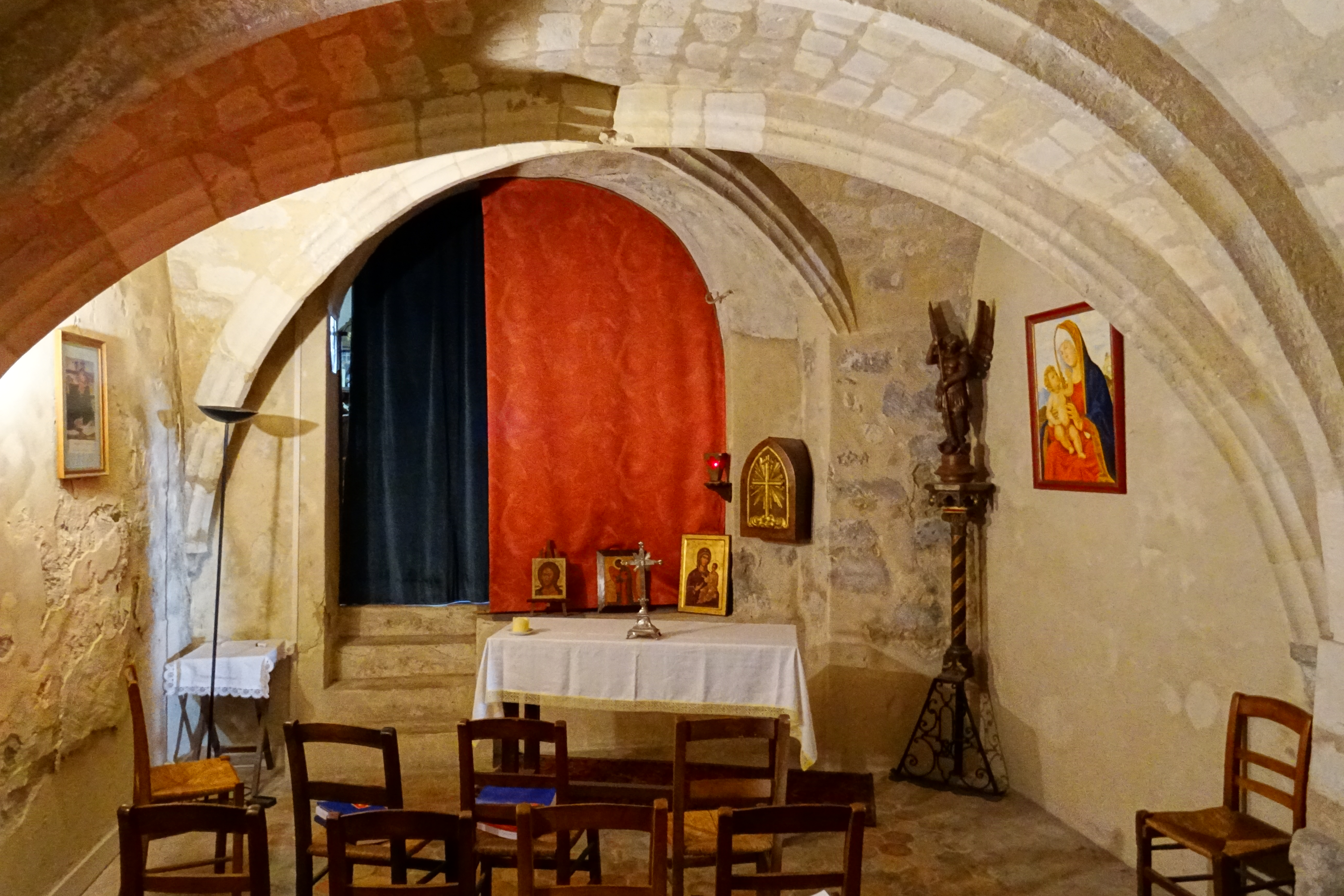 Intérieur de l'église - voir le titre du fichier.